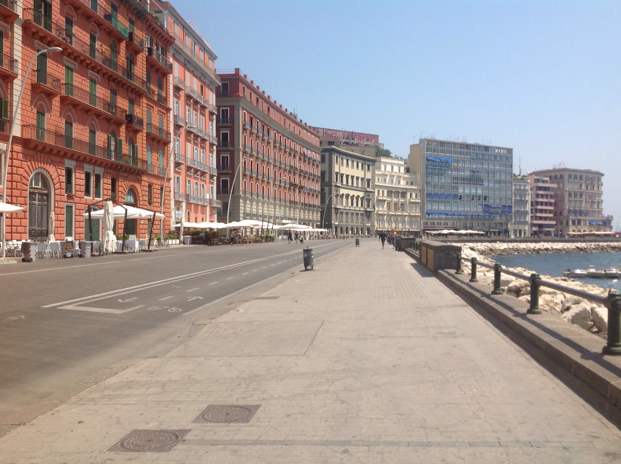 Via Partenope dopo la pedonalizzazione.